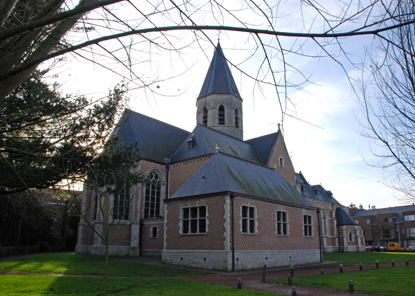 Parochiekerk Sint-Paulus, Sint-Pauwels (Sint-Gillis-Waas)